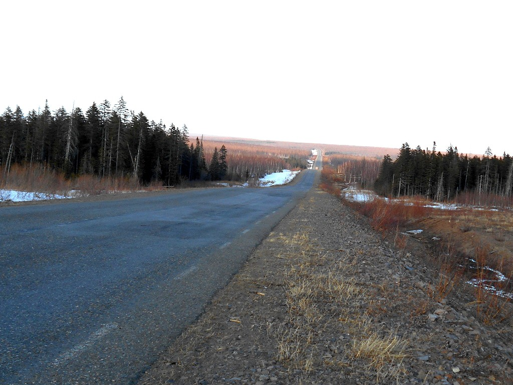 Дорога Ванино-Лидога